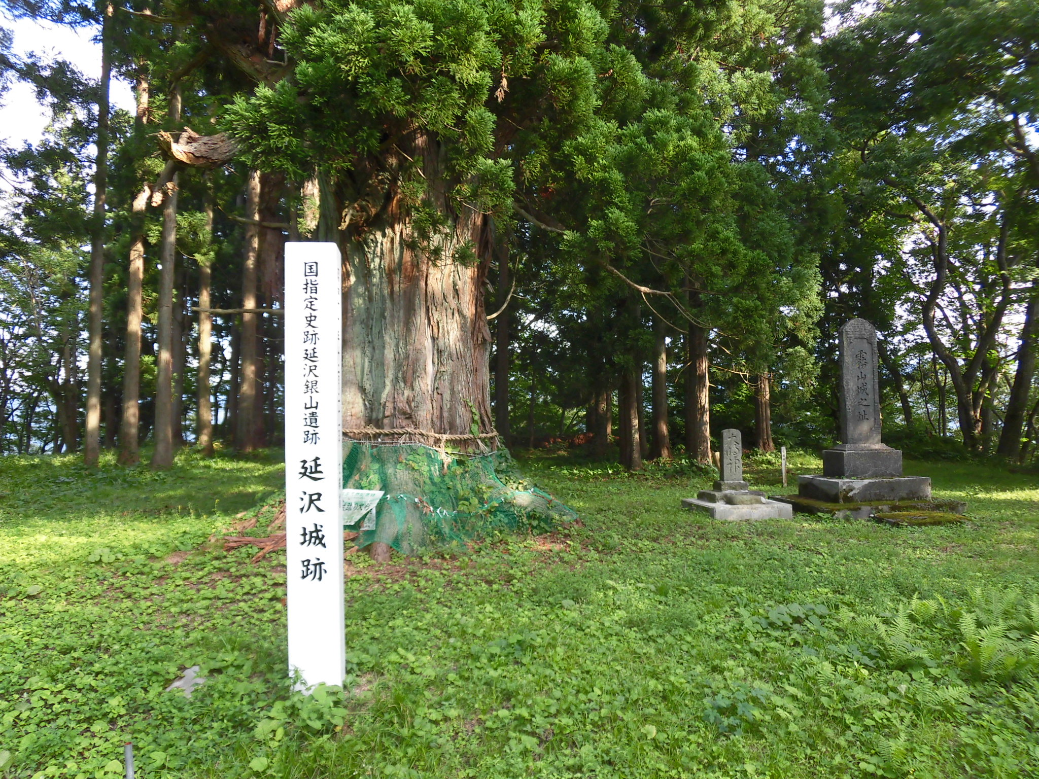 延沢城址。山形県尾花沢市に所在。別名に霧山城や野辺沢城とも。 延沢銀山遺跡の一環として昭和60年（1985年）に国の史跡に指定。 背後の木は山形県指定天然記念物「延沢城跡の大杉」（幹周り7.35m、推定樹齢1100年）。 傍らの石碑は「霧山城之址」。